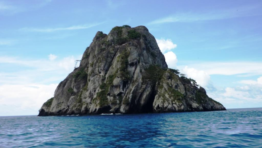 El Islote Manuelita es un sitio preferido para el buceo por la inmensa variedad de especies marinas que le circundan